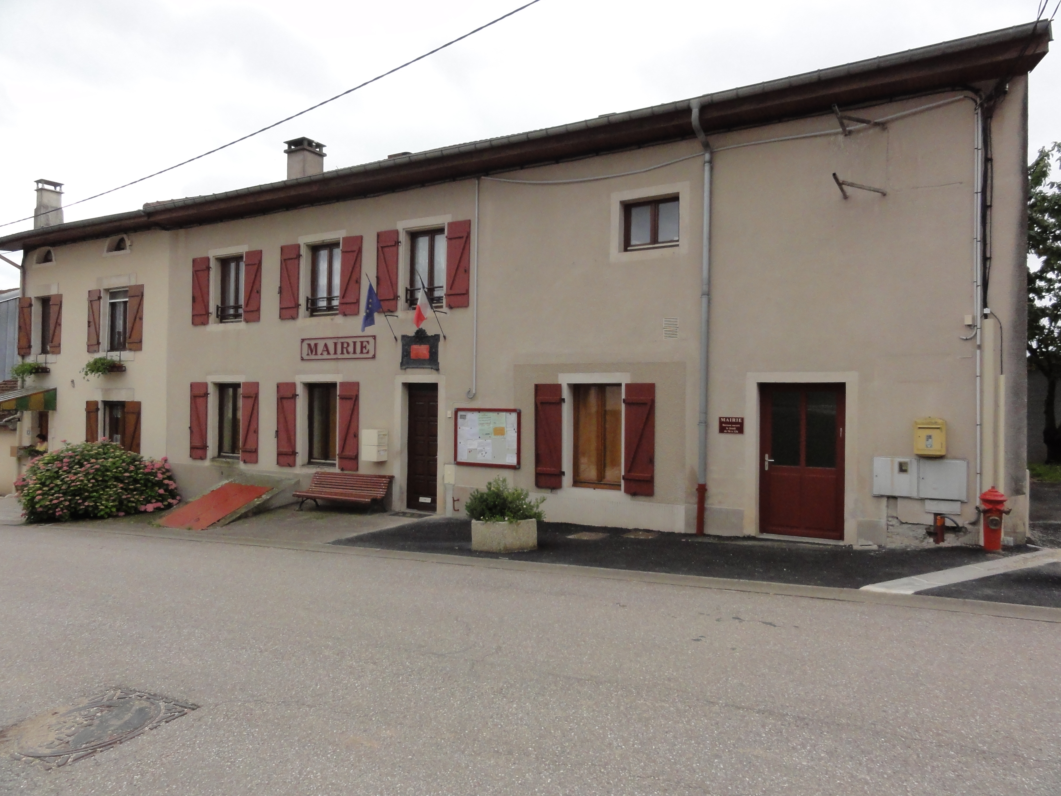 Bathelémont (M-et-M) mairie